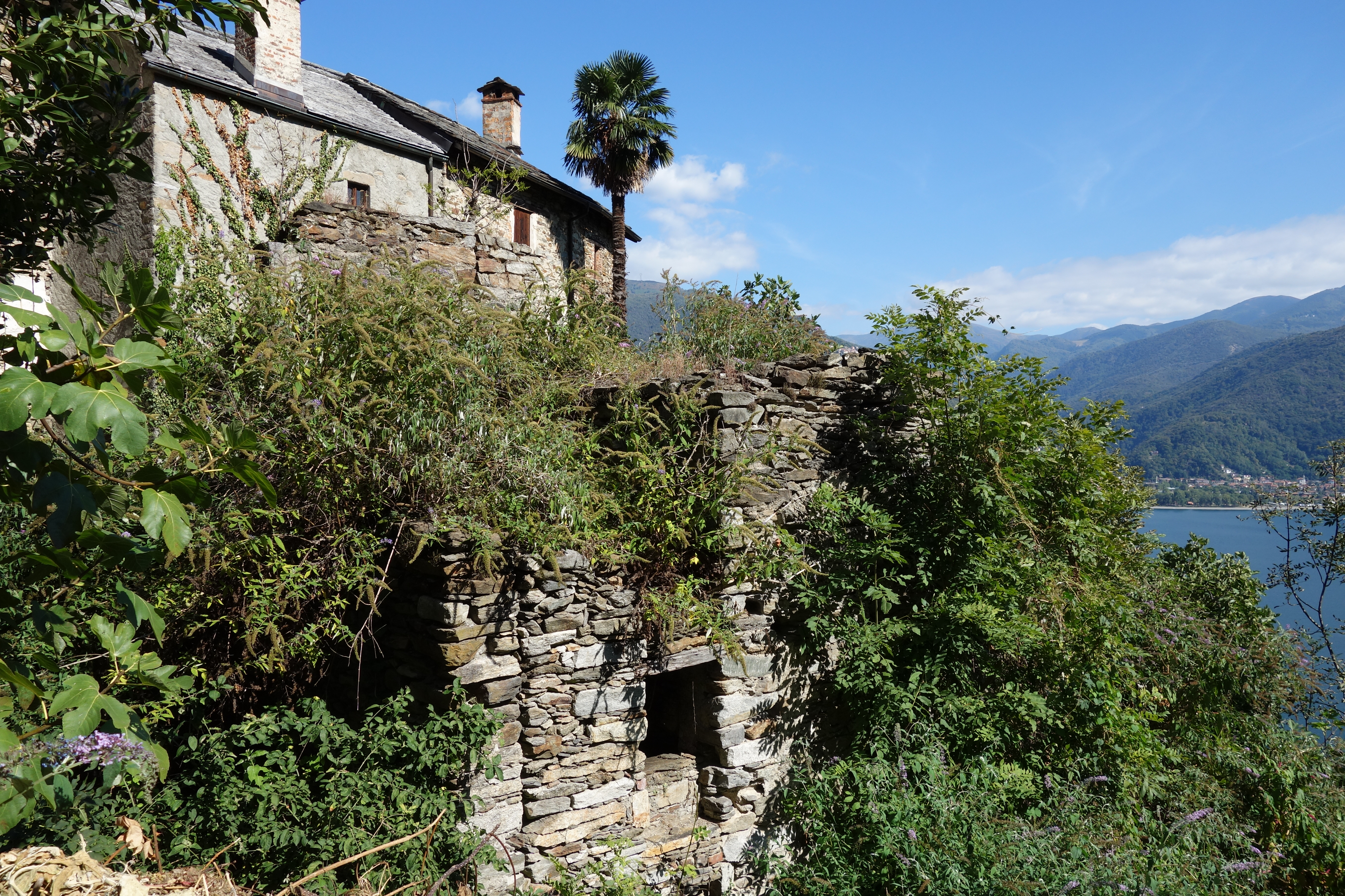 Mittelalterliches Dorf Carmine Superiore mit Blick auf den Lago Maggiore und die Berge der Lombardei